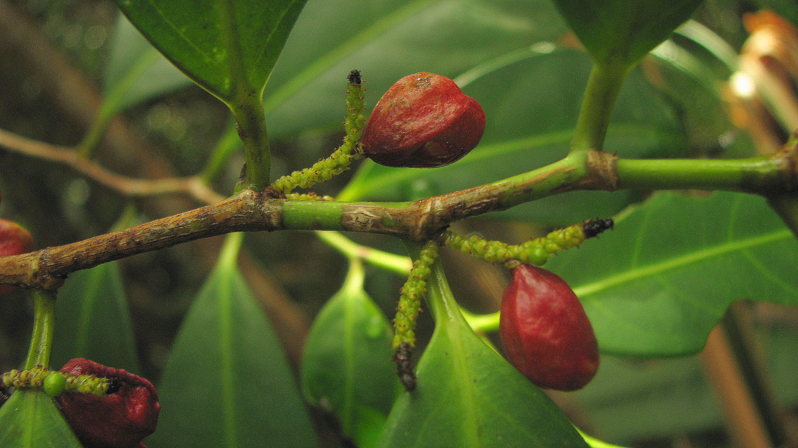 Lacistema hasslerianum Chodat